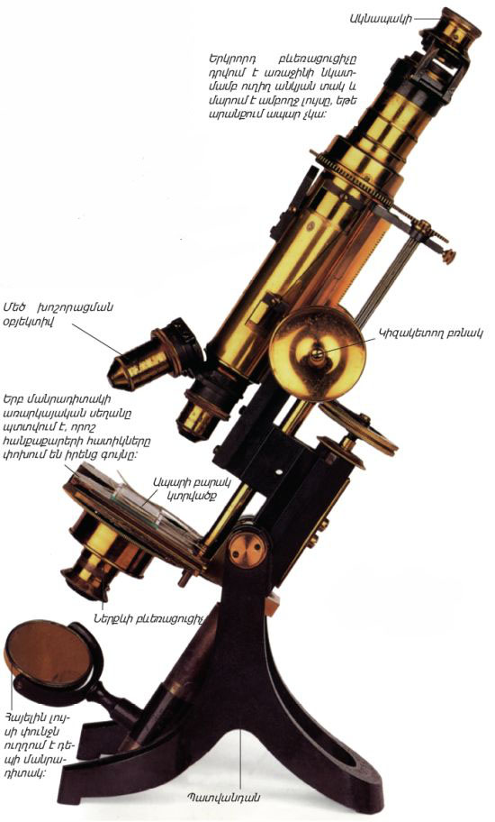 Ապարագետի մանրադիտակ